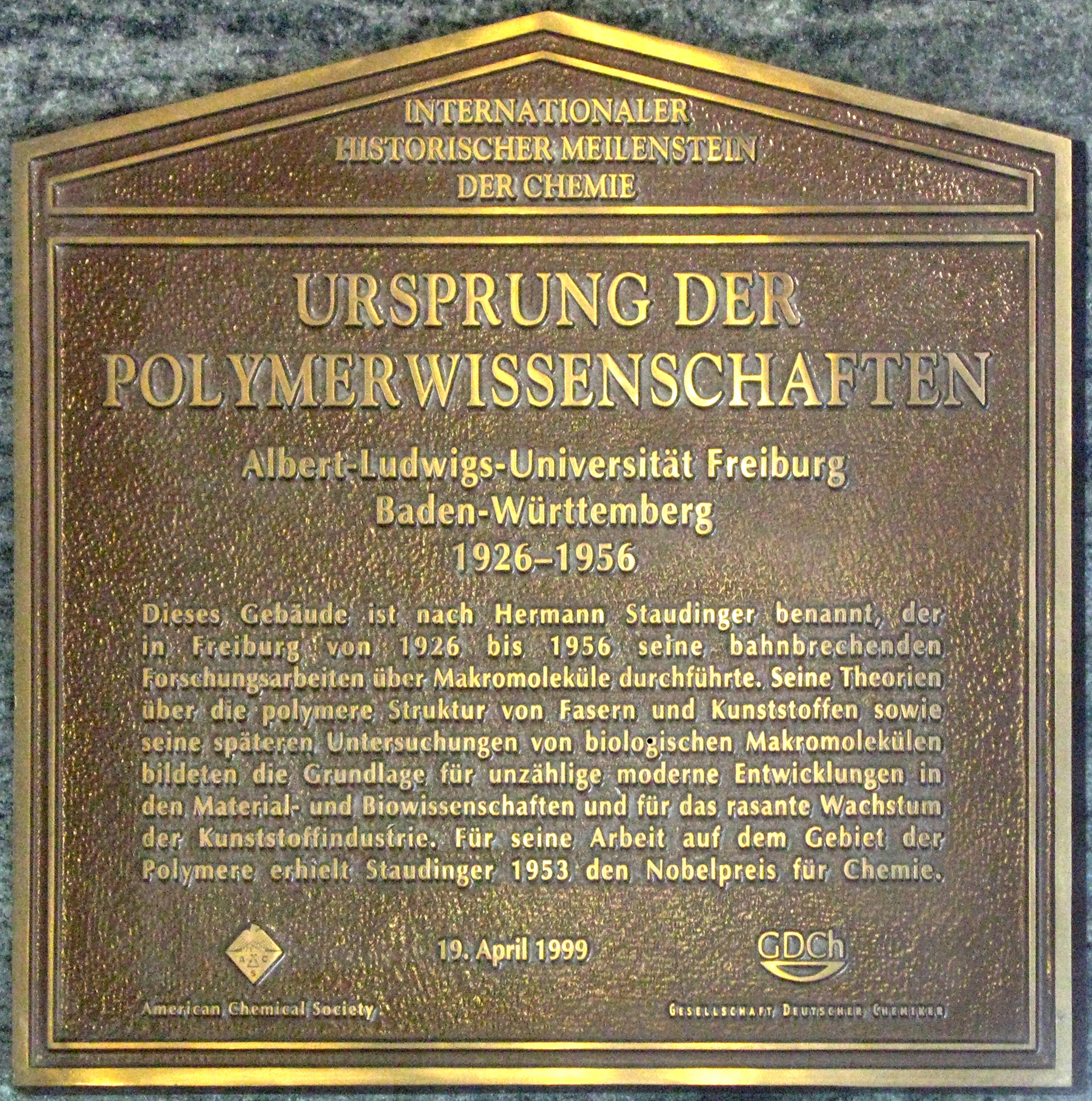 Gedenktafel im Eingangsbereich des Instituts für Makromolekulare Chemie der Albert-Ludwigs-Universität Freiburg/Breisgau, Hermann-Staudinger-Haus